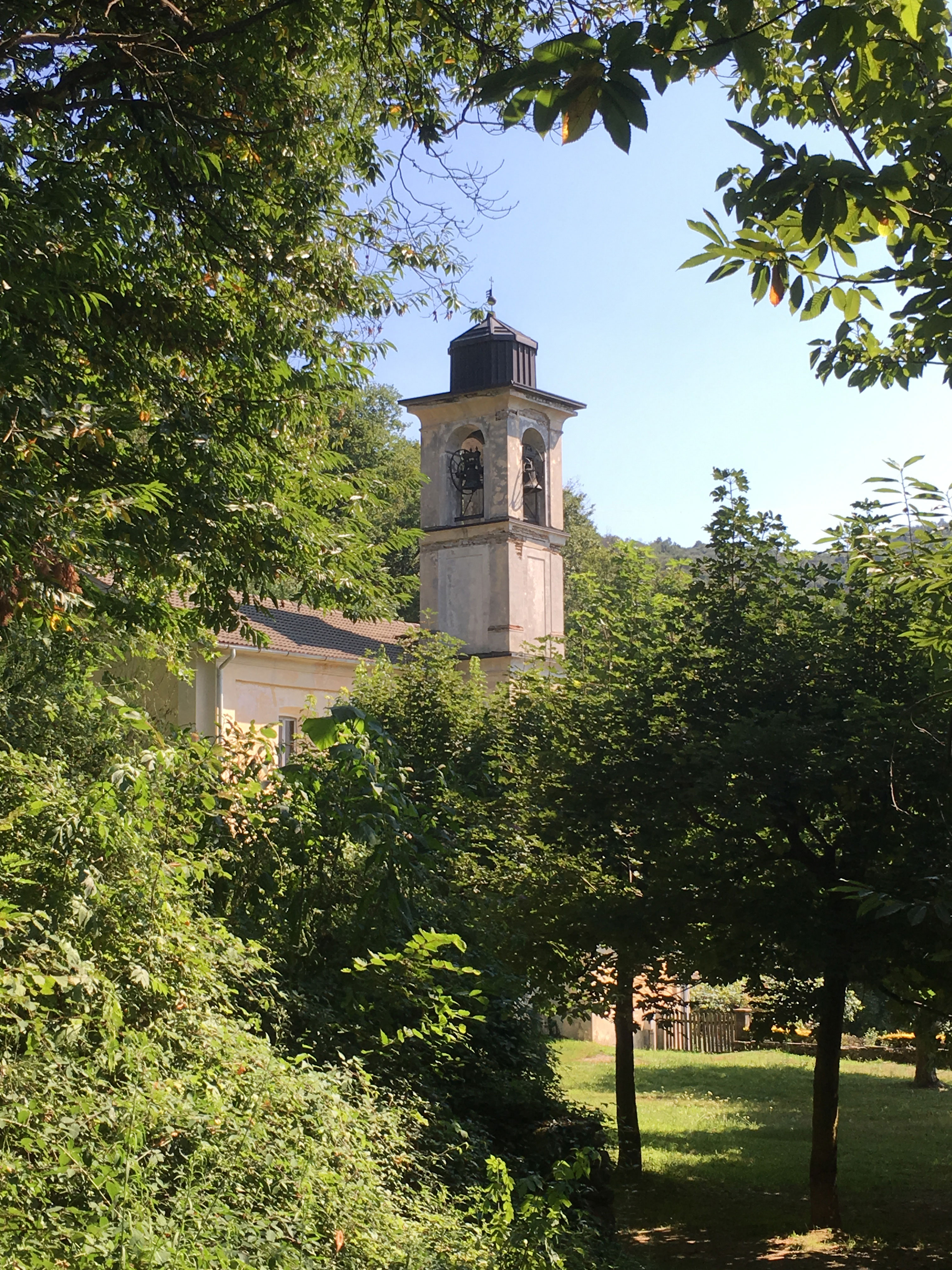 Aussenansicht der Marienwallfahrtskirche Santuario di Trezzo in Dumenza, Italien